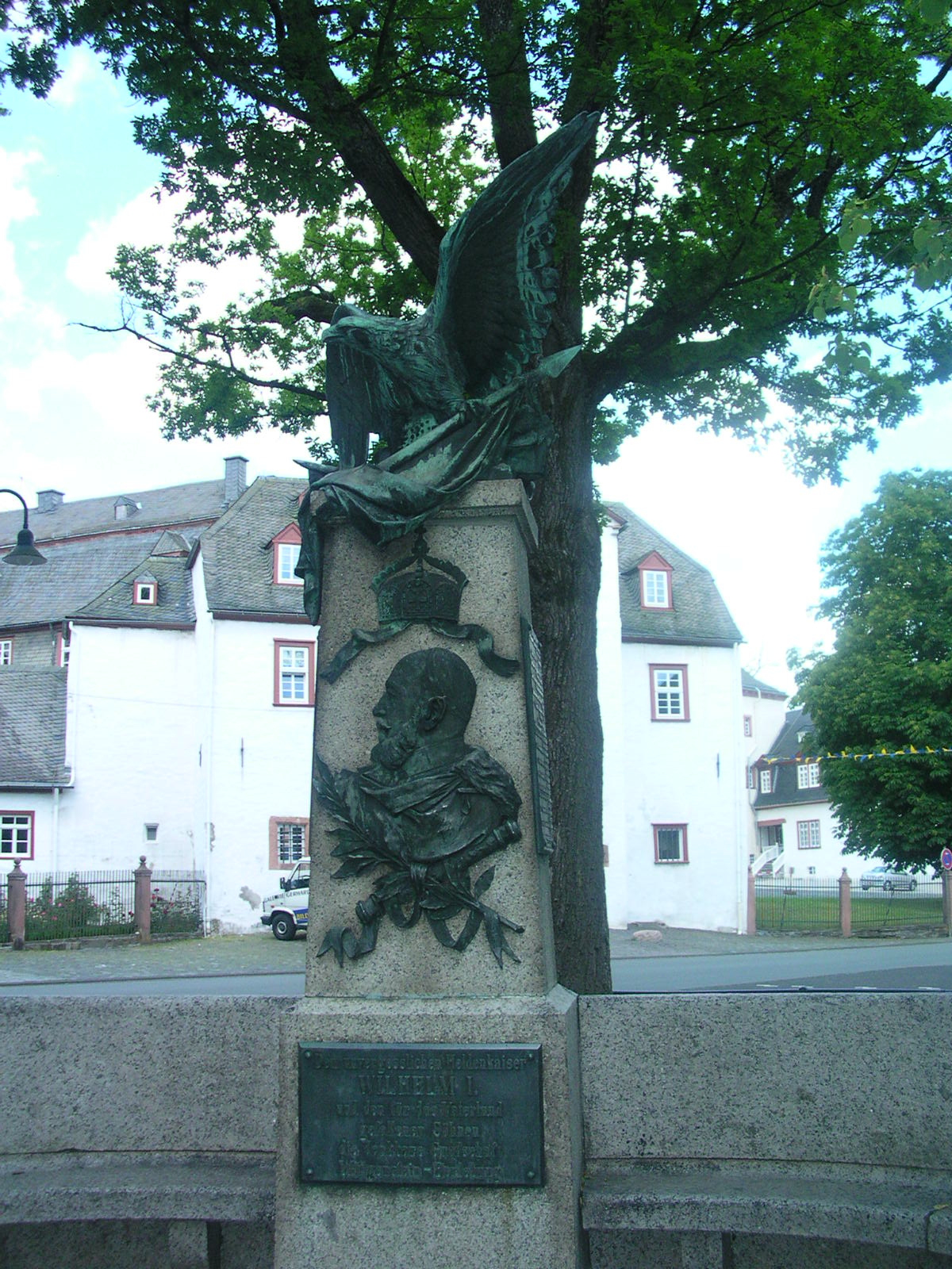 Bad Berleburg, Denkmal vor dem Schloß, “Dem unvergeßlichen Heldenkaiser Wilhelm I. und den für das Vaterlang gefallenen Söhnen die dankbare Grafschaft Wittgenstein-Berleburg”